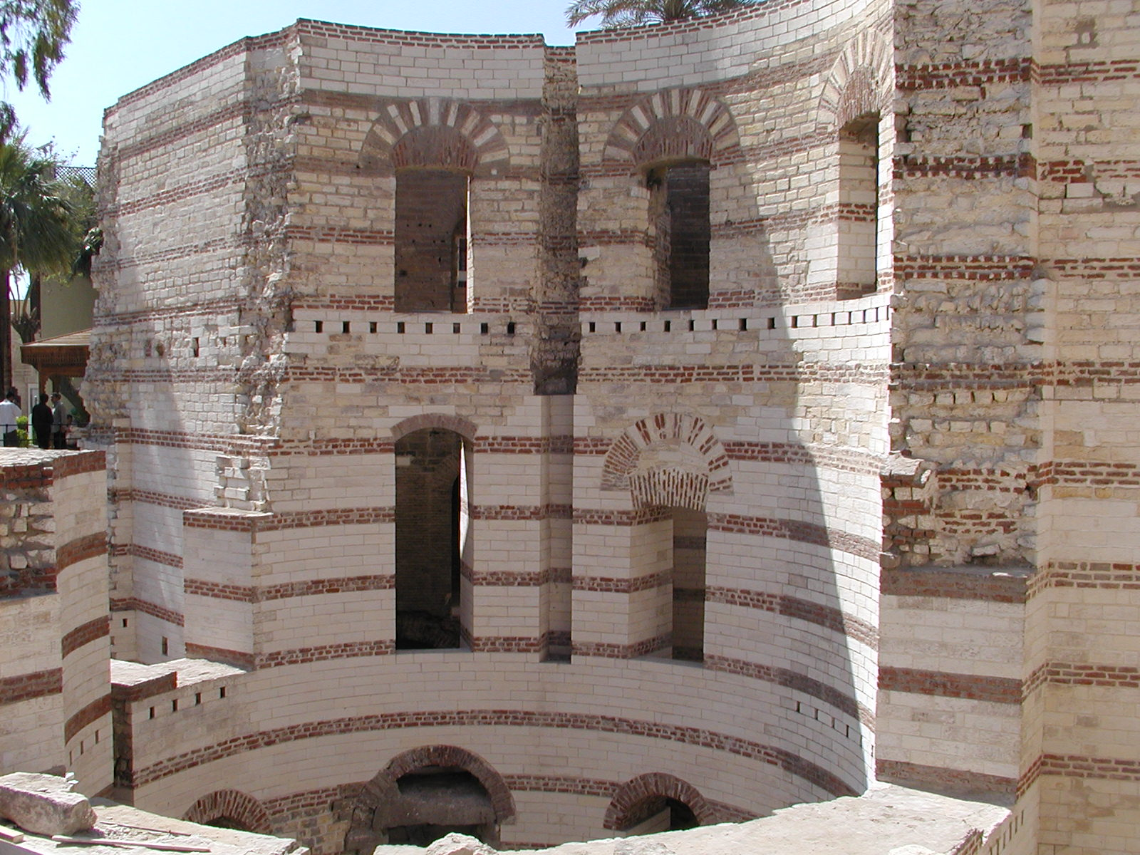 Tour de Babylone du quartier copte, (Le Caire, Égypte).